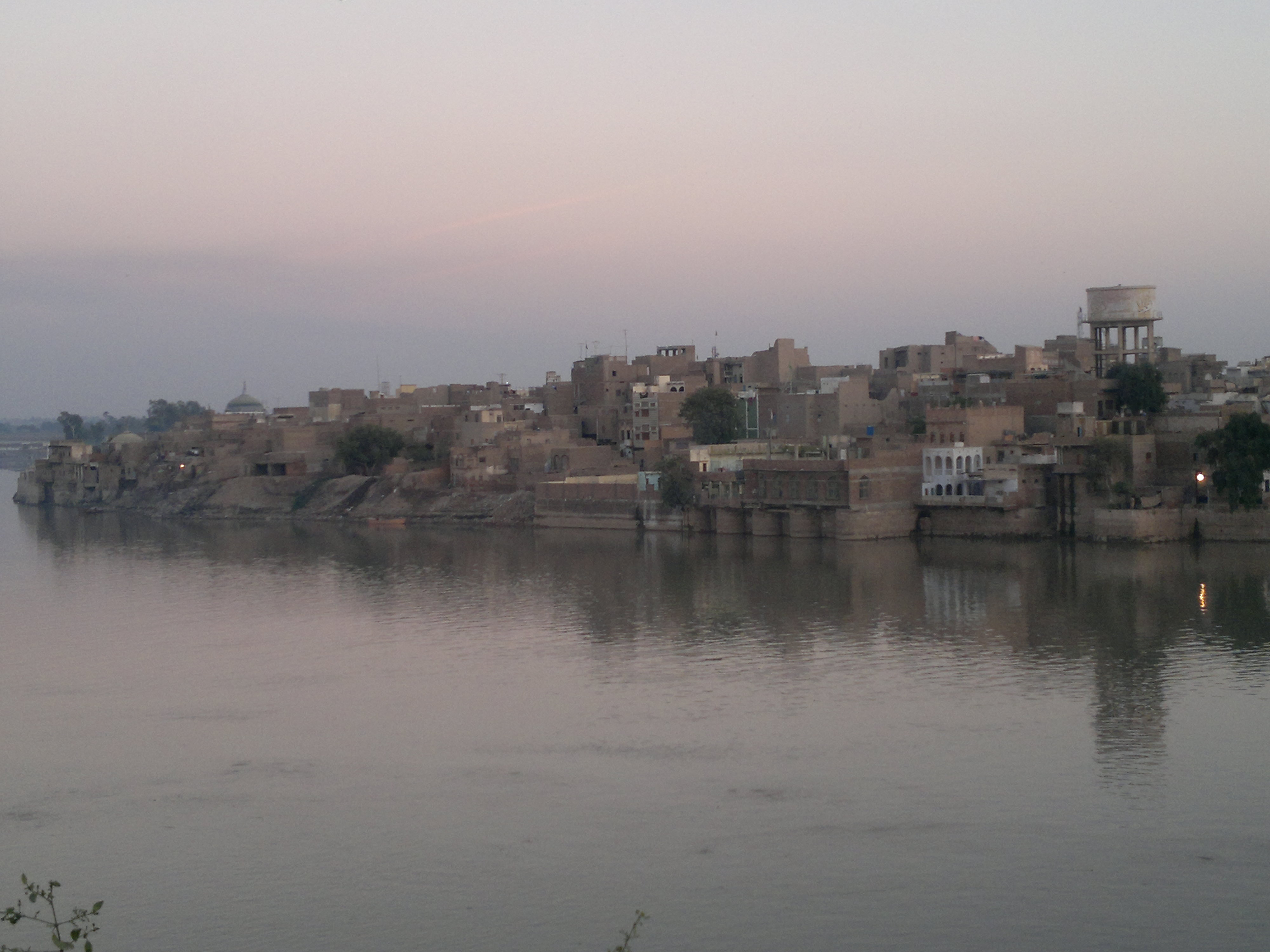 سنڌي: بکر ٻيٽ کان روهڙي جو ڏيک